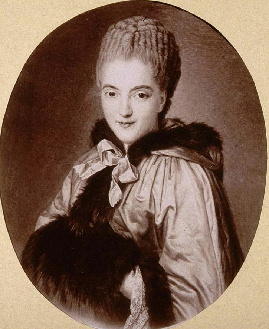 Madame Brunck de Freundeck, née Baron d'Autigny, épouse de l'helléniste (1729-1803), Mi-corps, face. Bibliothèque nationale et universitaire de Strasbourg